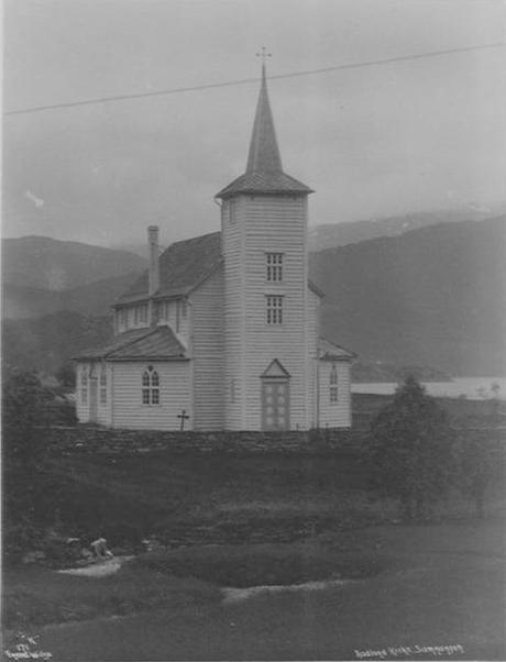 Samnanger kyrkje